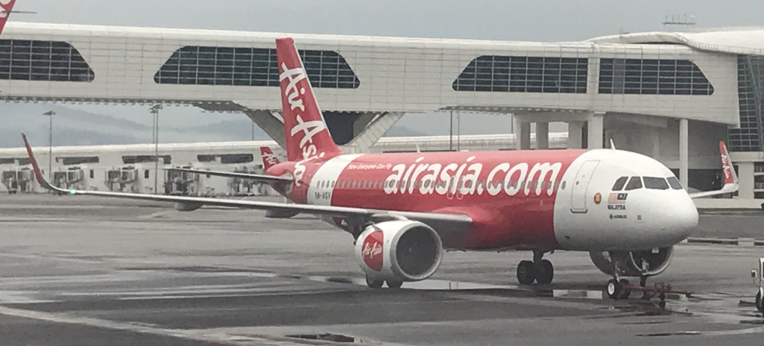 imej ini merupakan imej milik saya sendiri